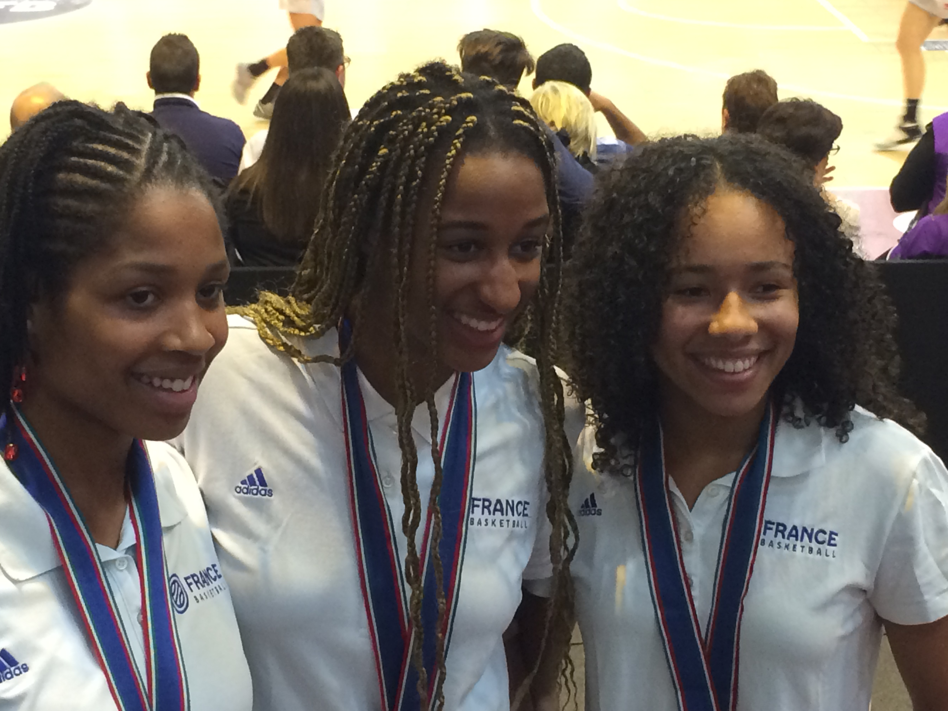 Trois joueuses de l'équipe de France U18 féminine ( X, Kadiatou Sissoko et Tima Pouye) lors de l'Open LFB 2016